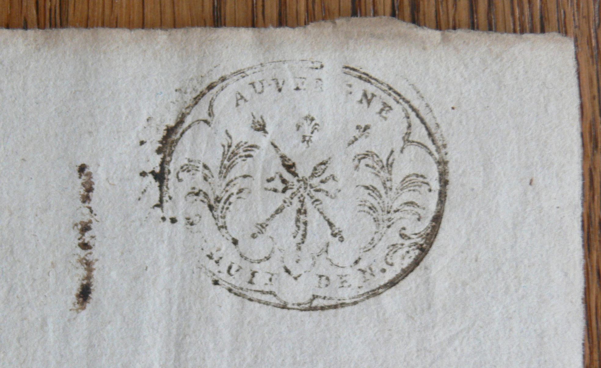 Timbre du papier (8 deniers) sur une sommation à venir plaider de 1745 (Auvergne)